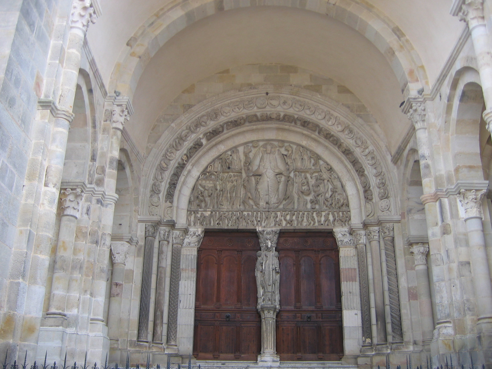 Tympan de la cathédrale d'Autun, France.